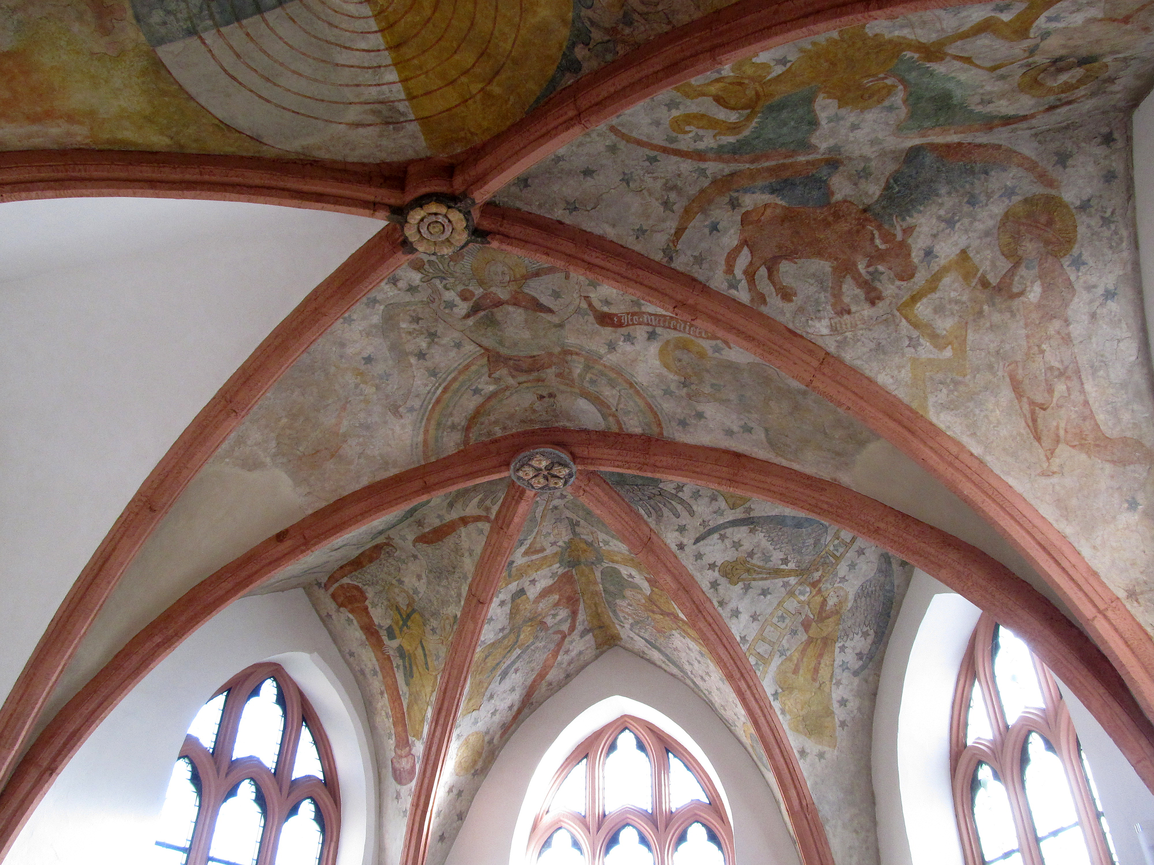 Fresken im Altarraum der evangelischen Martinskirche in Köllerbach, einem Stadtteil von Püttlingen, Saarland